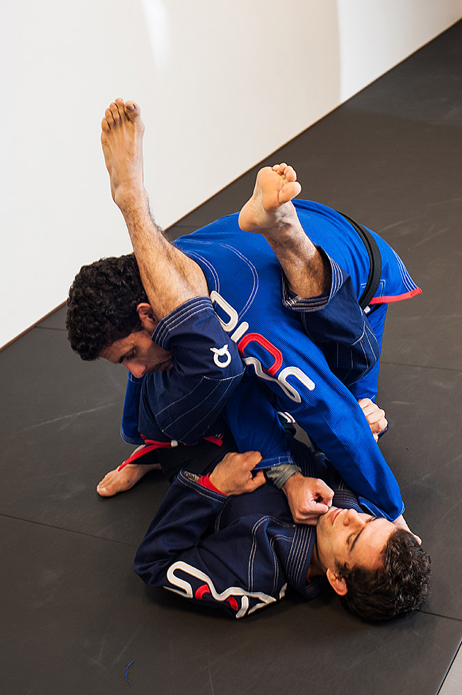 BJJ, Brasiliansk Jiu-Jitsu